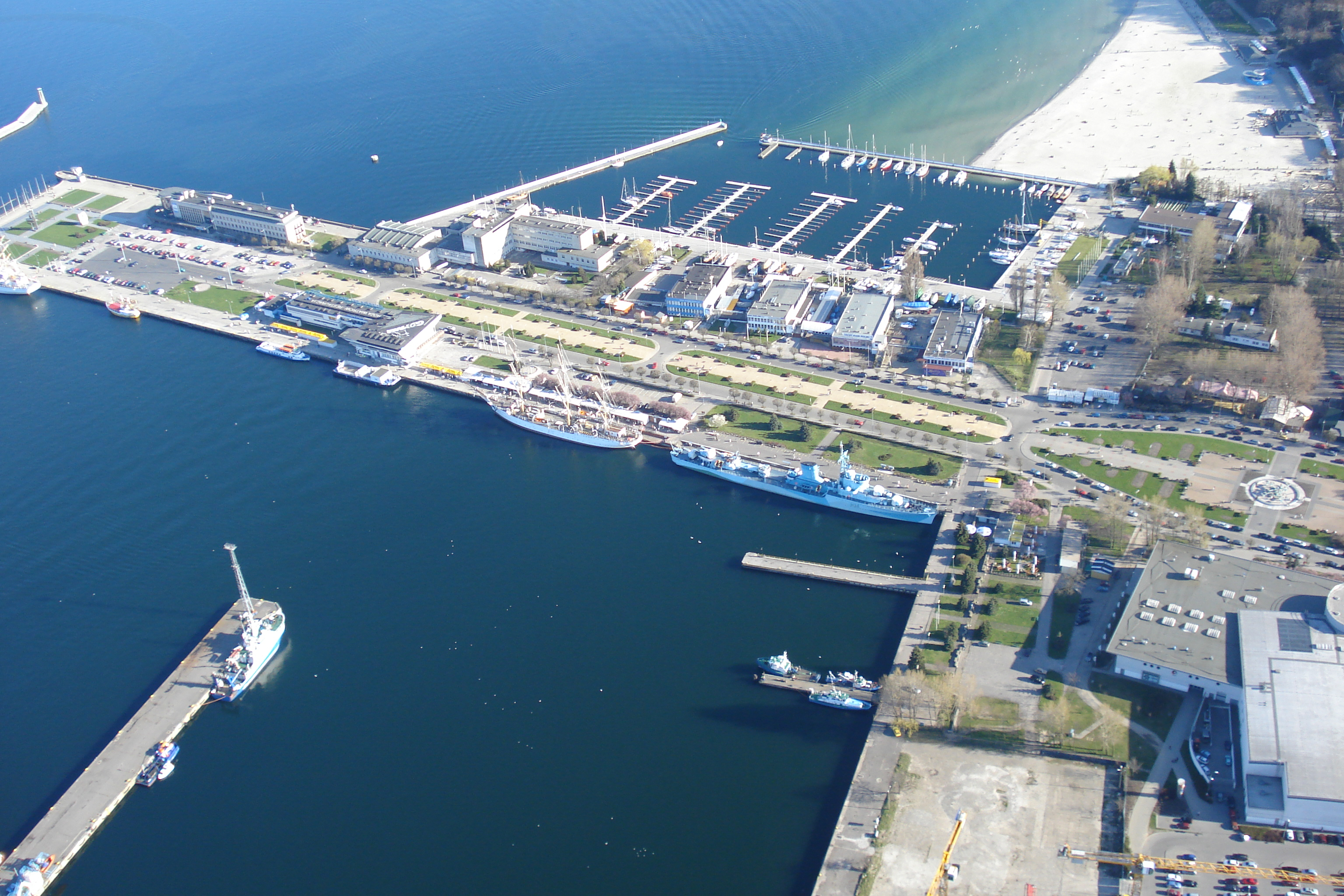 Gdynia z "lotu ptaka"